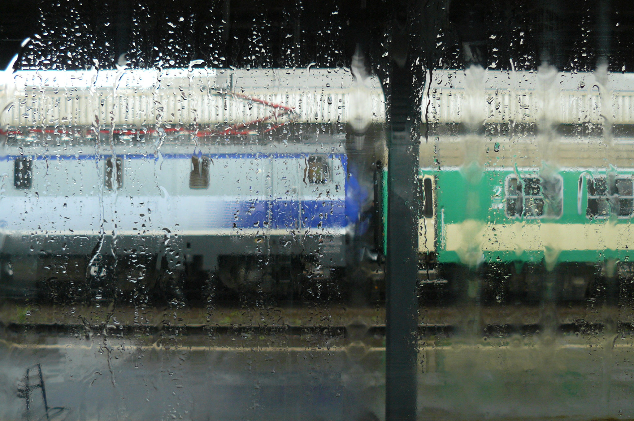 Deszcz. Poznań Gł. 8.6.2013r.